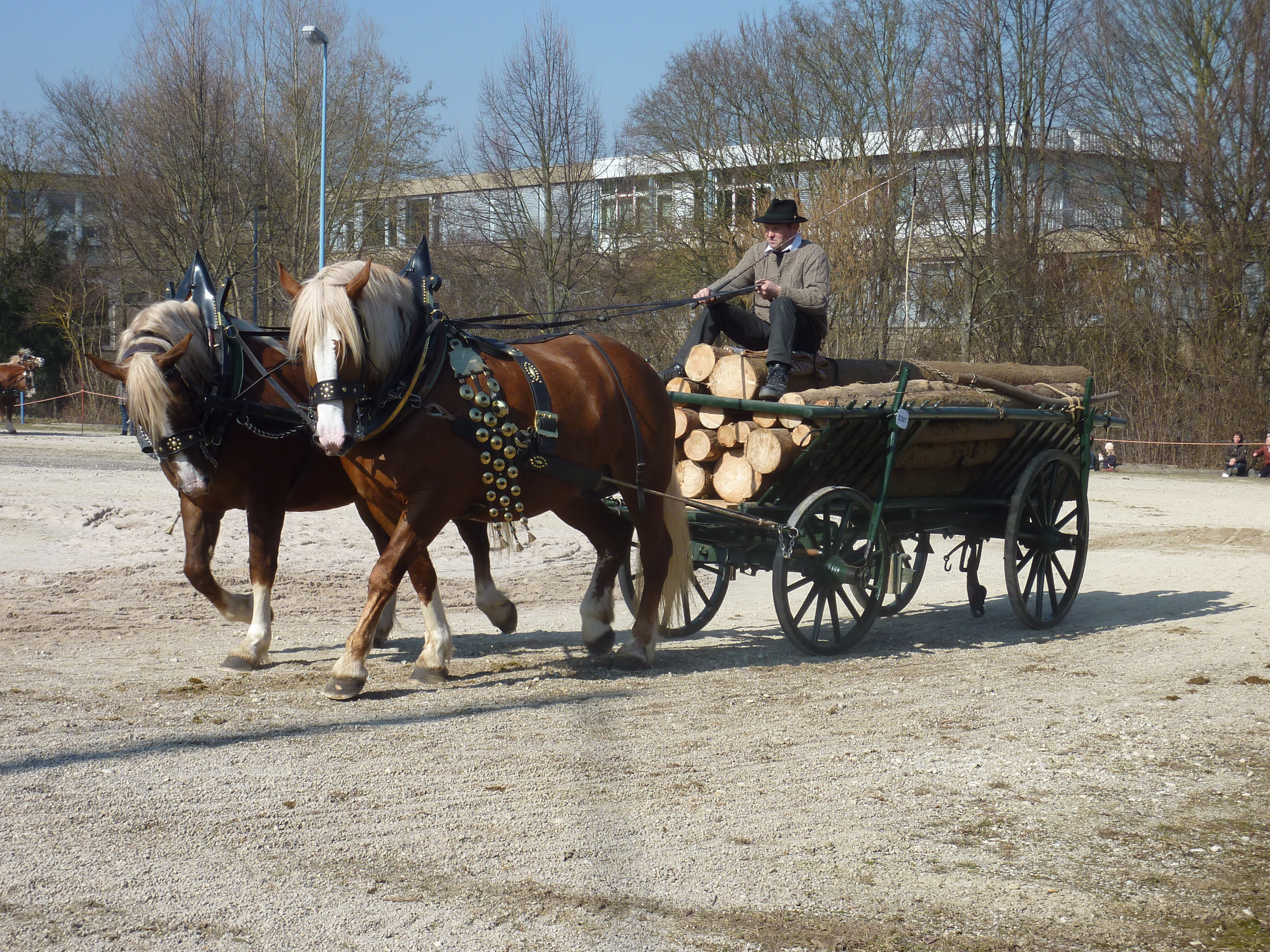 Bernhausener Pferdemarkt